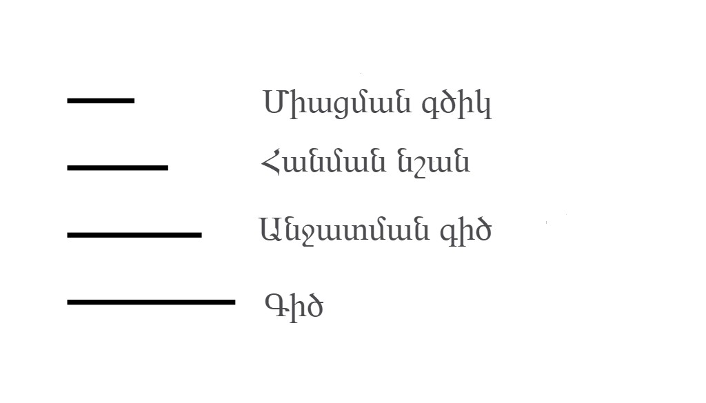 Դիագրամ